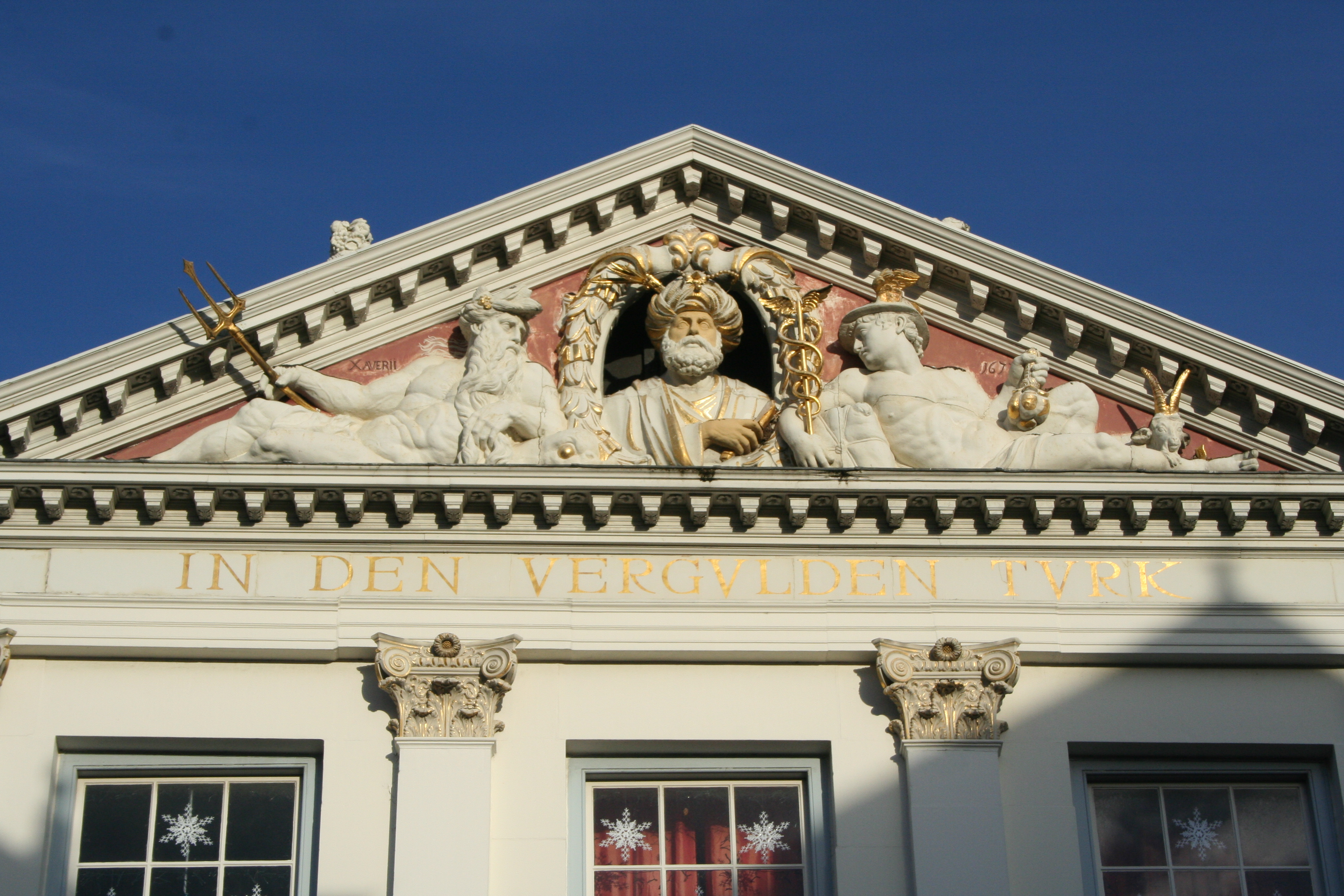 Dit is een foto van het fronton van de in den vergulden turk. Gemaakt door mij (robert smit) met mijn canon eos 350D. Sculpture made by Pieter Xavery in 1673. Building itself probably by Willem van der Helm.